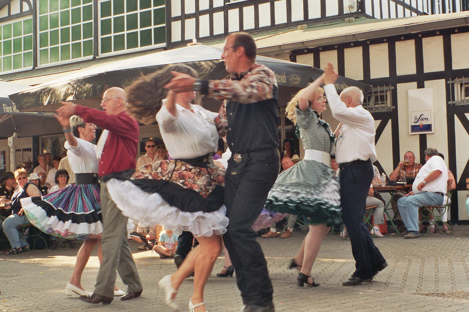 Square Dance Group